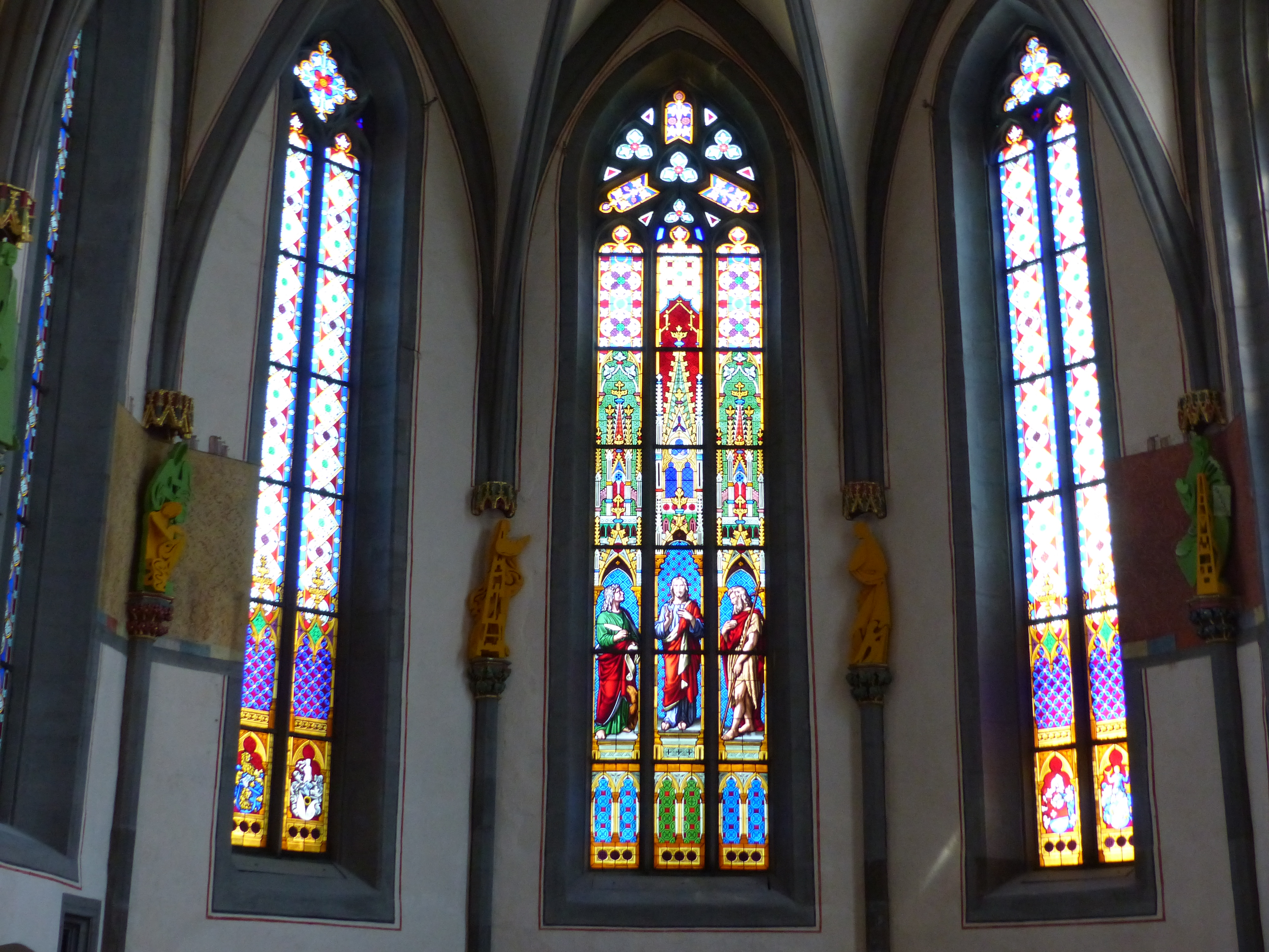 St Johann, Schaffhausen: Chor mit neugotischen Fenstern des Glasmalers Johann Heinrich Müller (1822-1903), Bern, aus dem Jahr 1881.